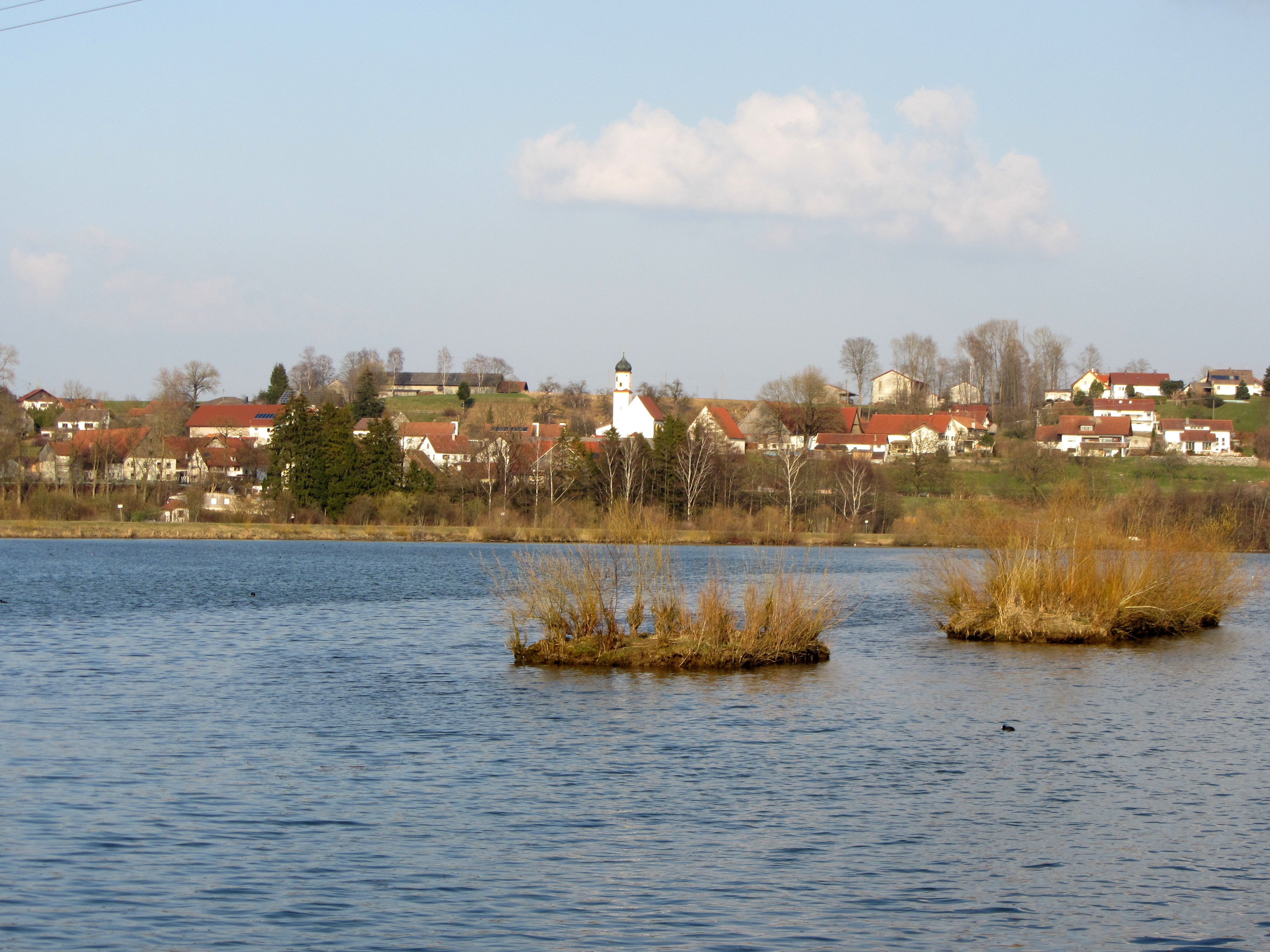 Iller-Kraftwerk Stufe VIII (Lautrach)